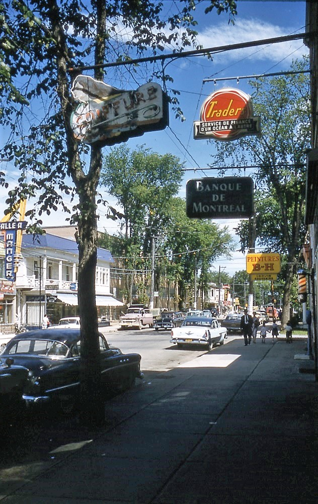 Diapositive couleur illustrant la rue principale de la municipalité de Mont-Laurier dans la région administrative des Laurentides.